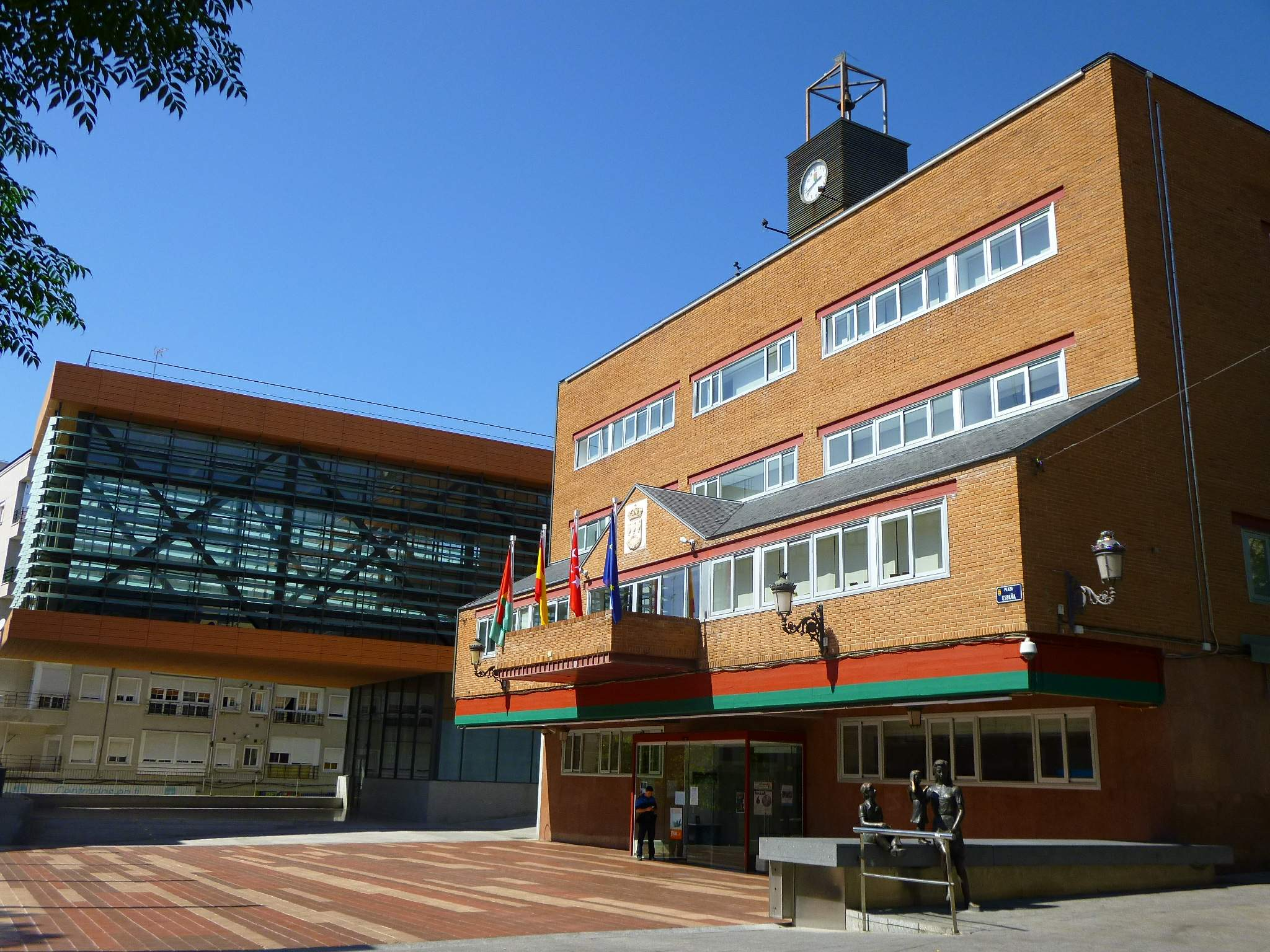 Ayuntamiento de Alcorcón (Madrid)